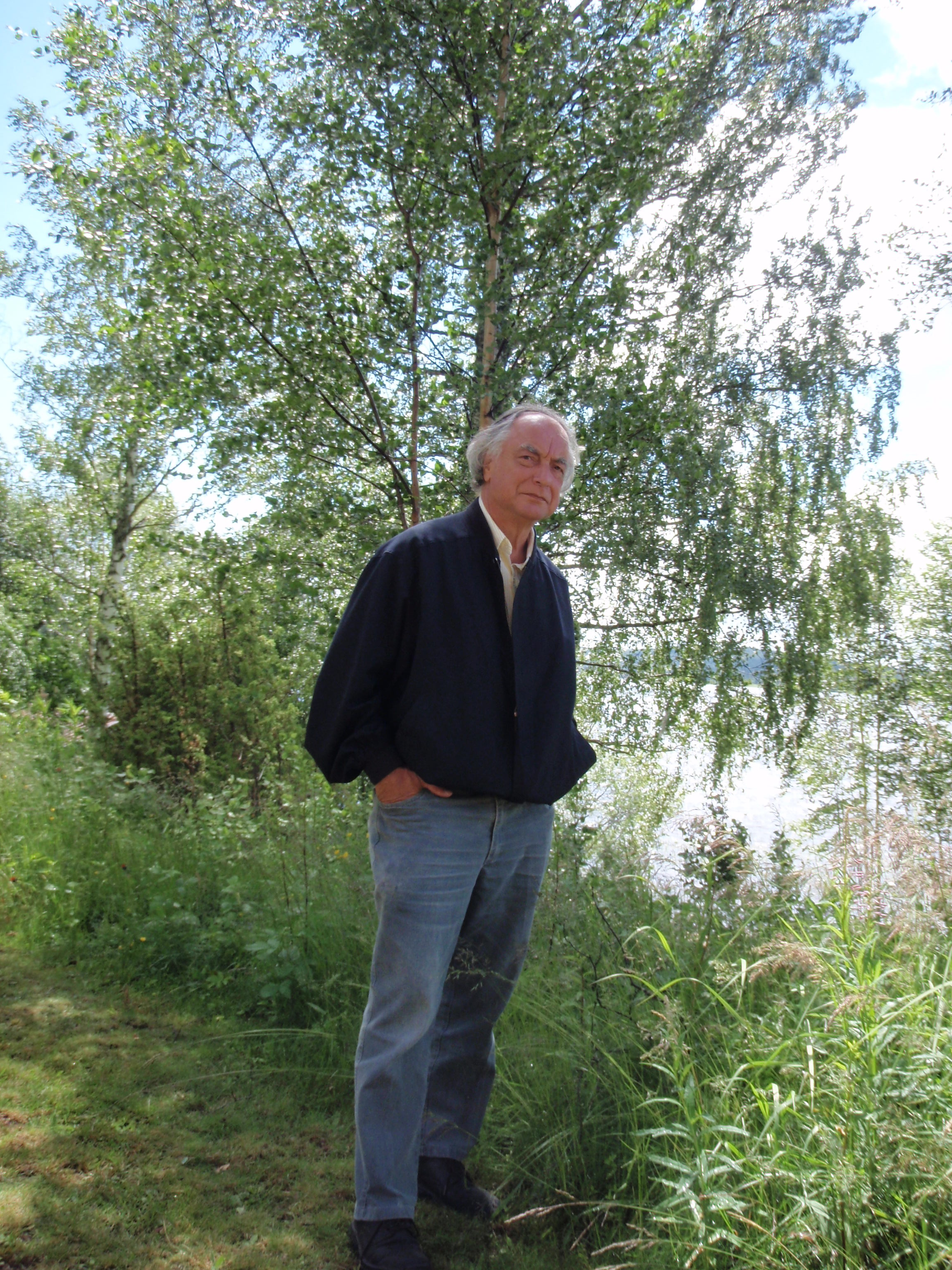 Jacob Vis aan een meer in Zweden